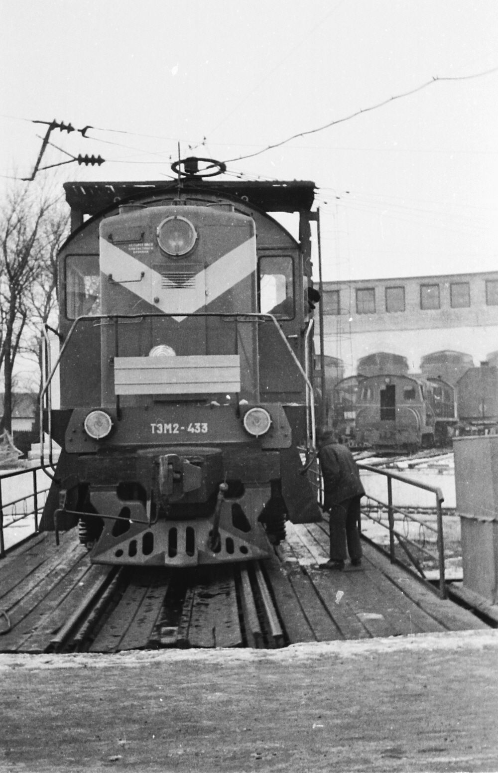 Тепловоз ТЭМ2 на поворотном круге Уссурийск 1977 год